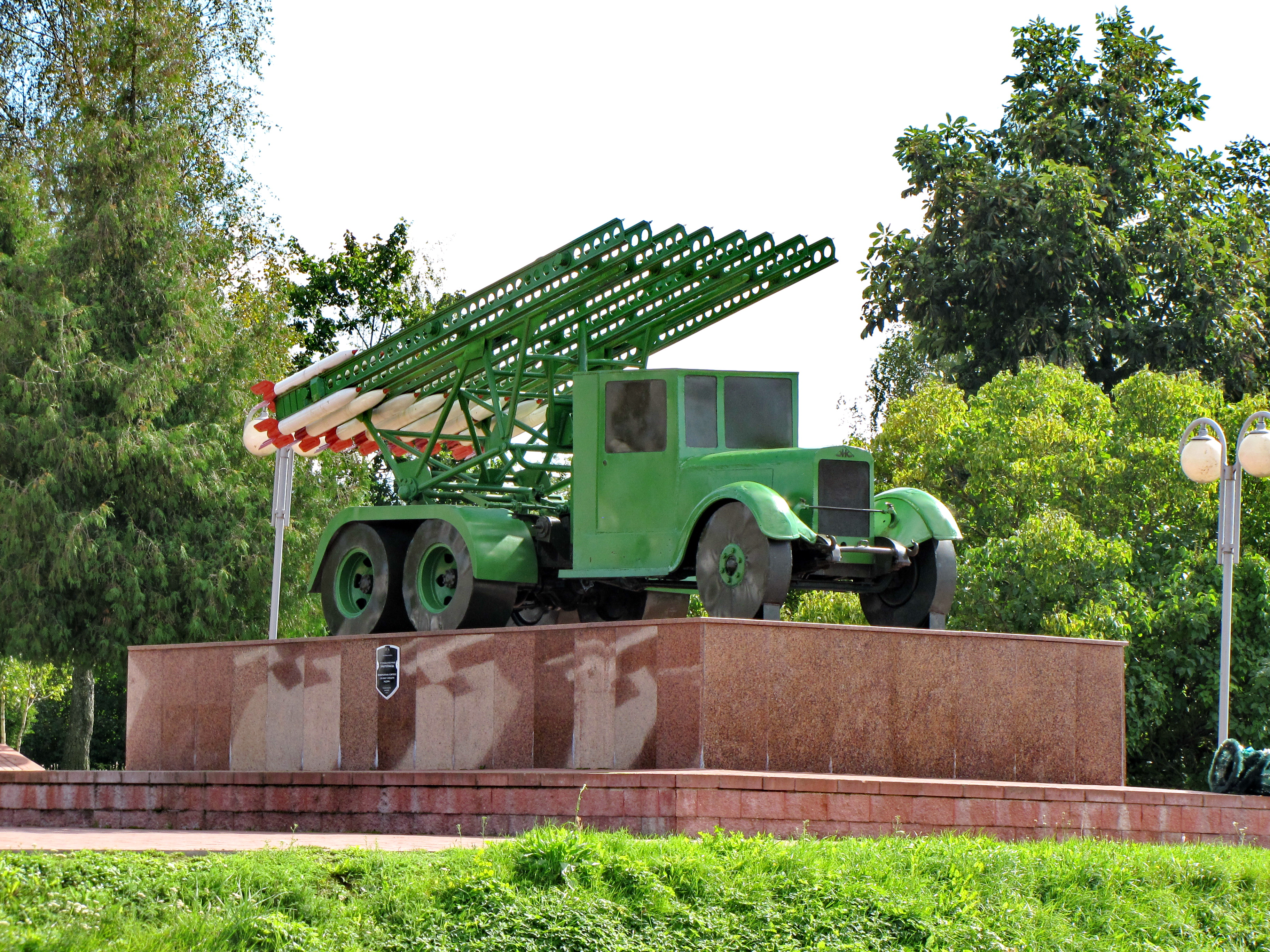 Беларуская (тарашкевіца): Мэмарыяльны комплекс «Кацюша». г. Ворша